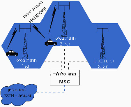 תרשים של מערכת סלולרית